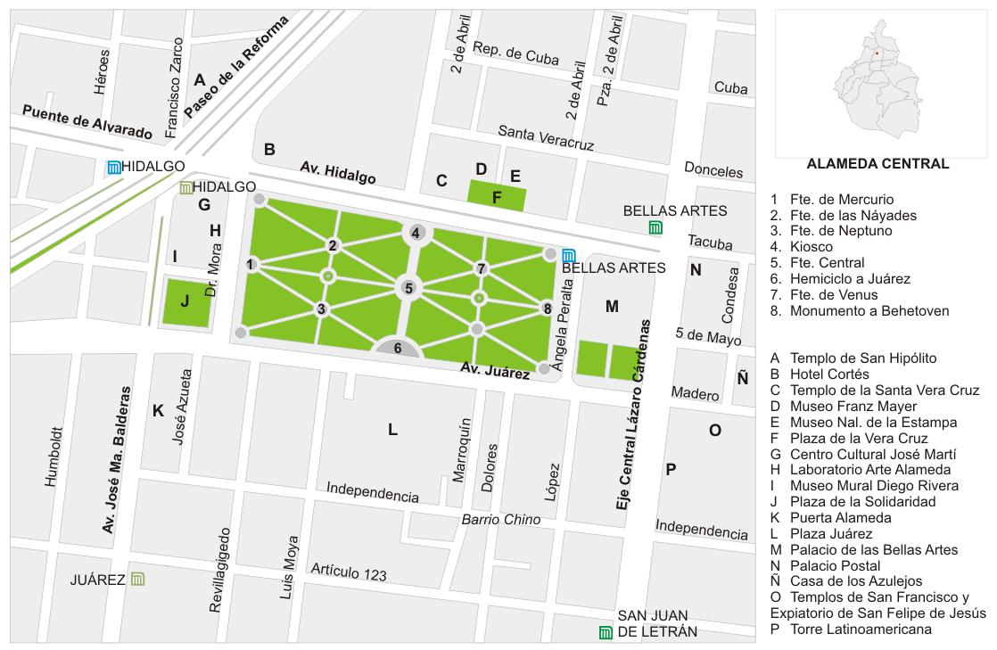 Plano de la Alameda Central de la Ciudad de México